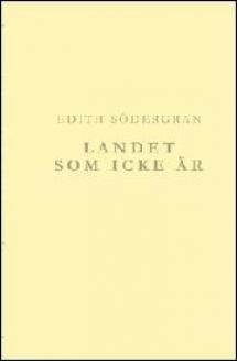 Edith Södergran, Landet som icke är, 1925 postuumi runokokoelma